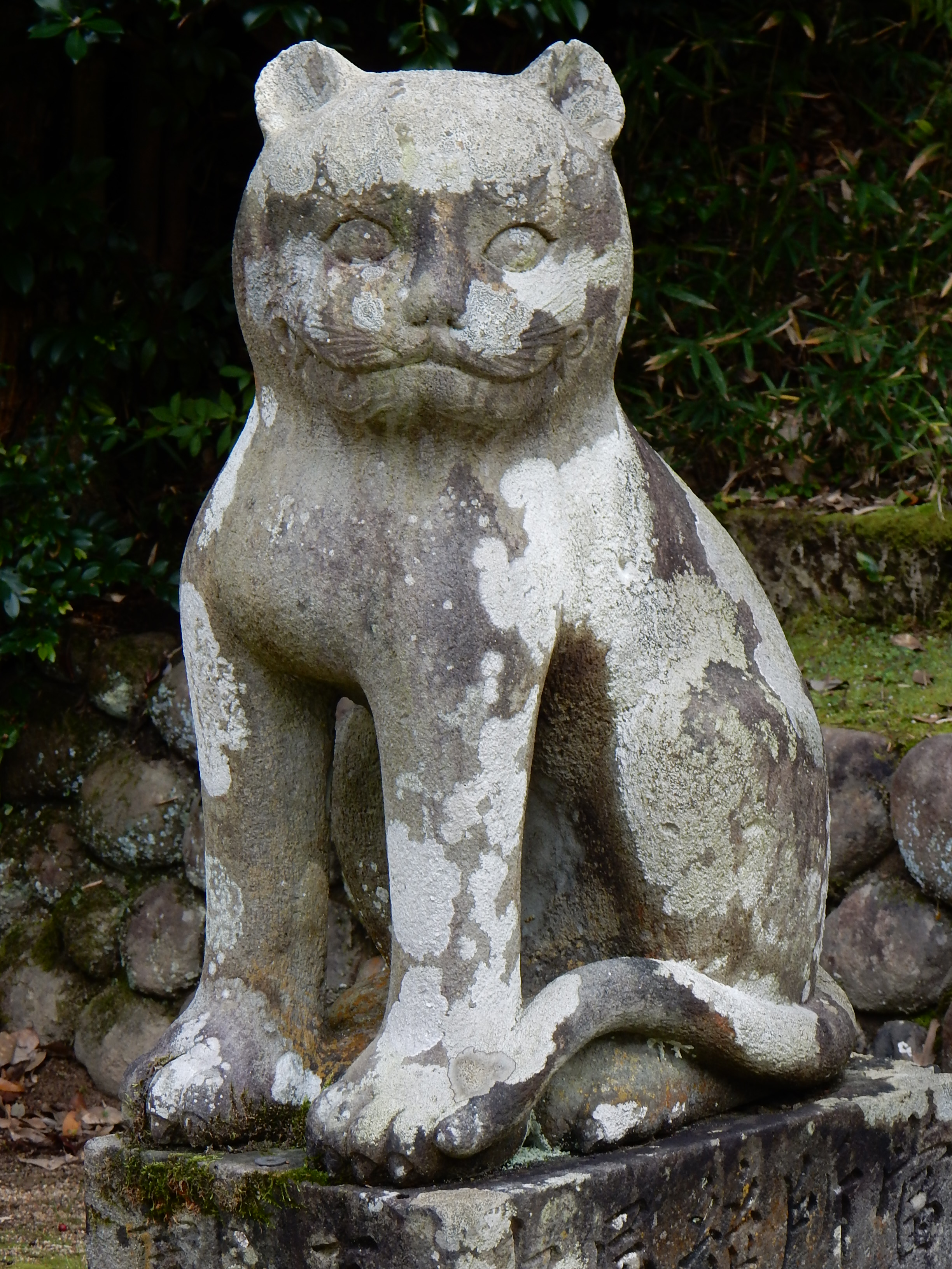 京丹後市峰山町泉に所在する金刀比羅神社の末社である木島神社に奉納された「狛猫」。